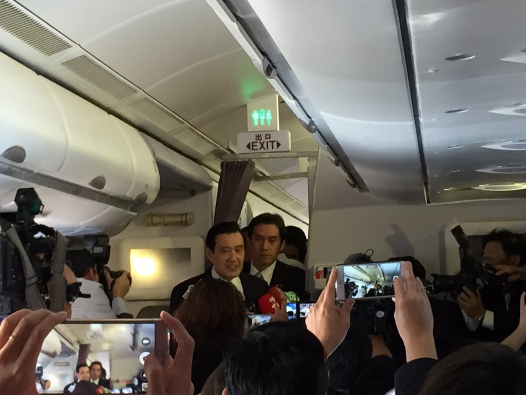 馬英九總統抵達新加坡